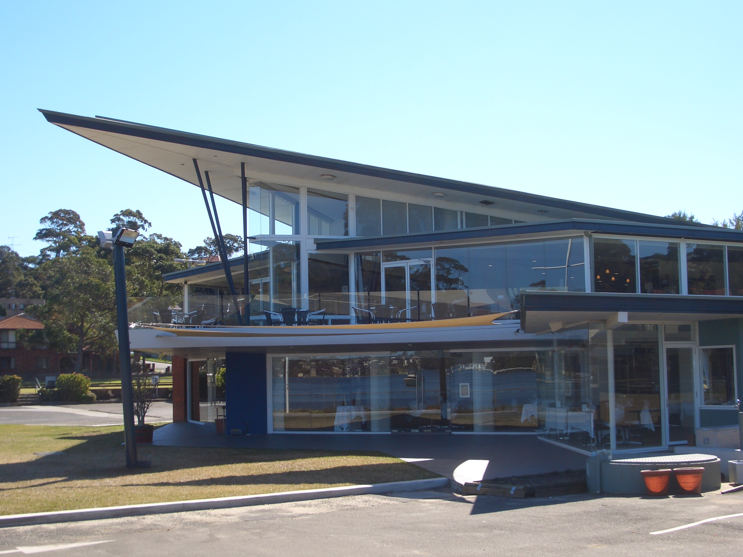 Kyle Bay, Sydney